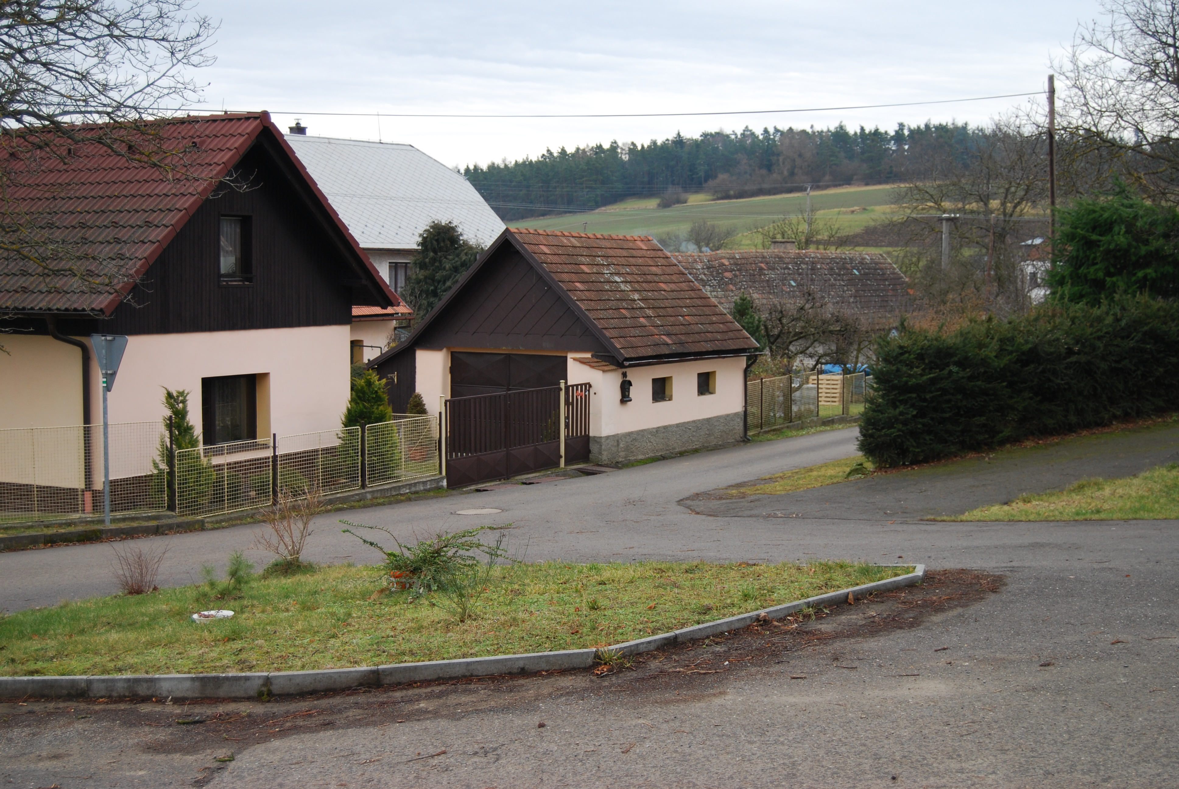 Pohled na část obce. Cetyně v okrese Příbram, kraj Středočeský. Česká republika. - OpenStreetMap (Info)